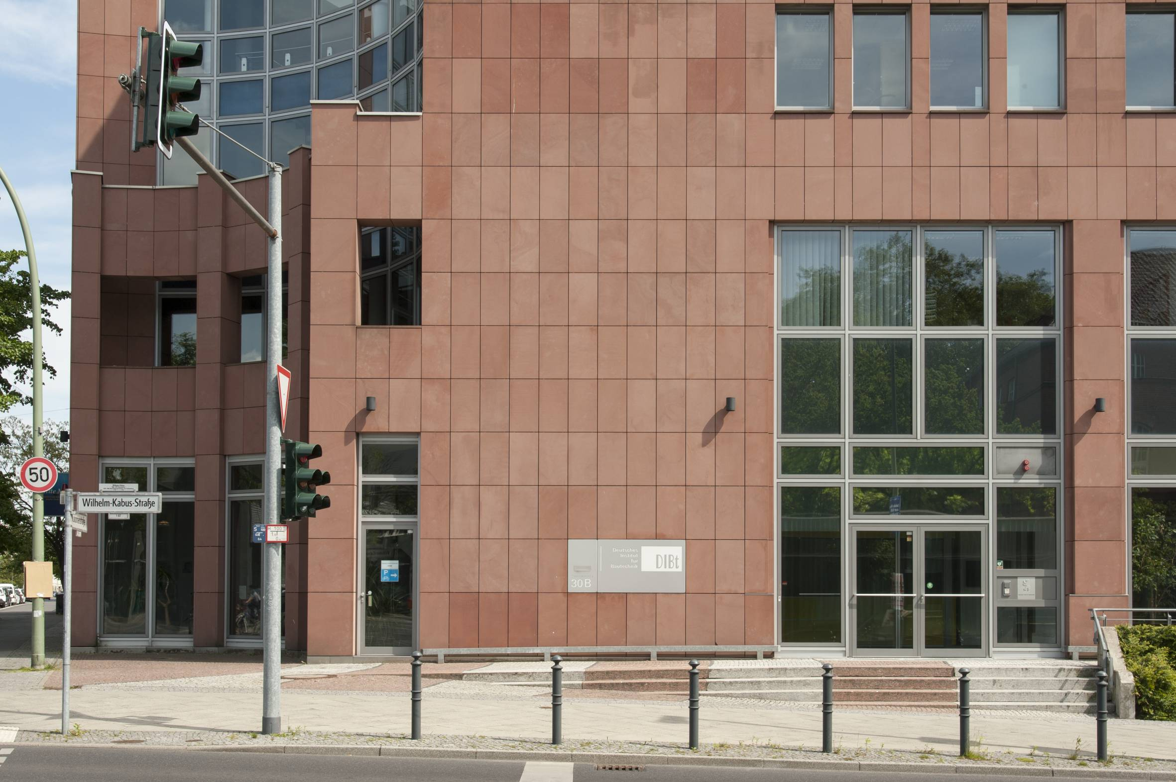 DIBt, Berlin – Eingangsbereich, außen